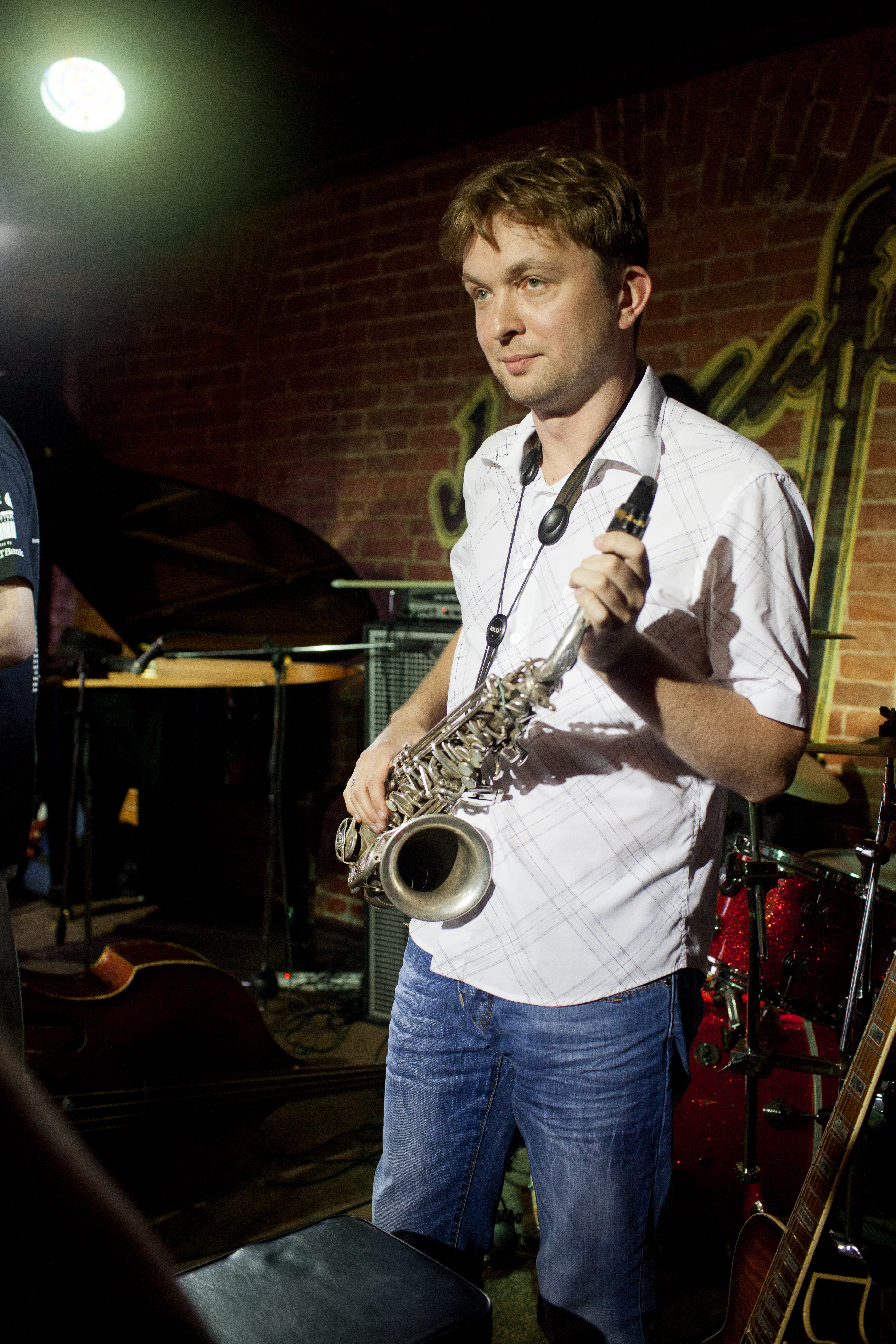 Фестиваль Leo Records в Джаз-кафе "Эссе", 2013